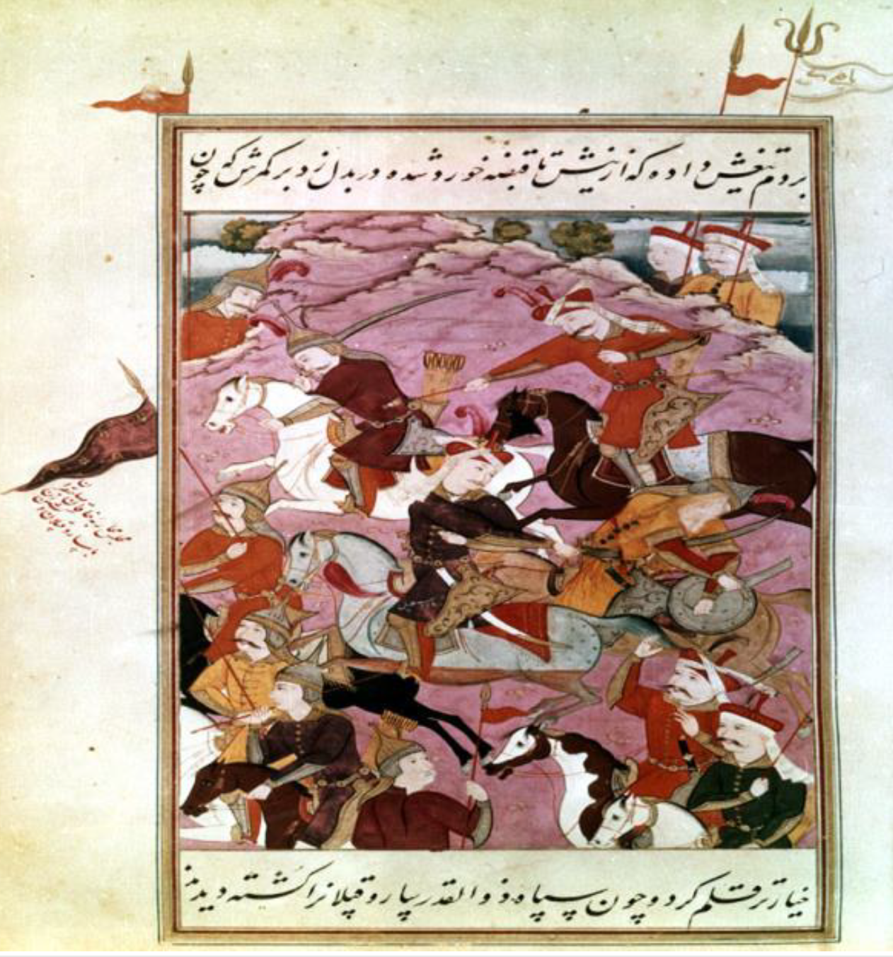 Şah İsmail’in Sarı Kaplan’a karşı savaşı (“Târîh-i ‘Âlemârâ-yi Şâh İsma‘îl”in bir nüshasına Muîn Musavvir’in çektiği minyatür; Tahran, Rıza Abbasî Müzesi, Kaligrafi Bölümü, No. 600, v.87a)